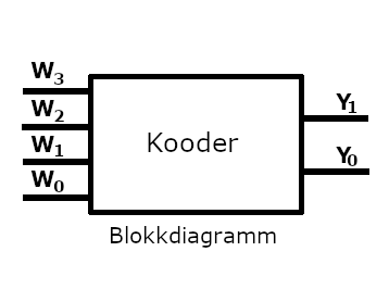 4-2 bitise kahendkoodri blokkdiagramm